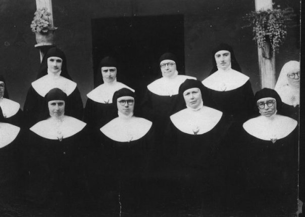 Comunidad de hermanas bethlemitas de Gramalote, Norte de Santander, Colombia, en los años 40